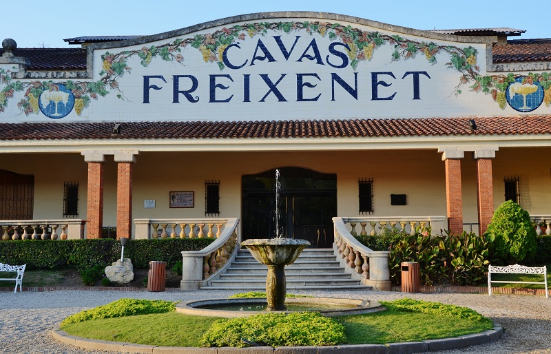 Caves Freixenet (Sant Sadurní d'Anoia)